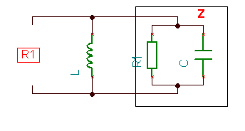 Sisendreaktiivsuse kompenseerimine. Rööbiti oleva mahtuvusega arvestamine. Tehtud TinaSpice'i abiga.